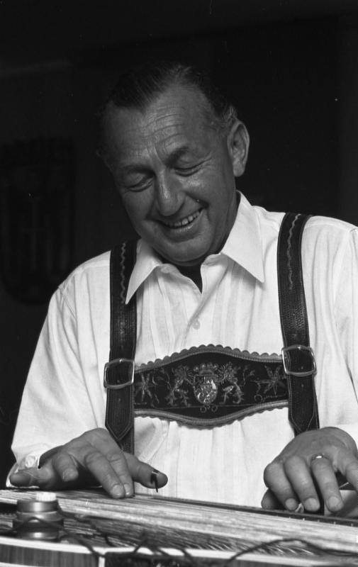 Zitherspieler Alfons Schmidseder in der Landesvertretung Bayern Bonn